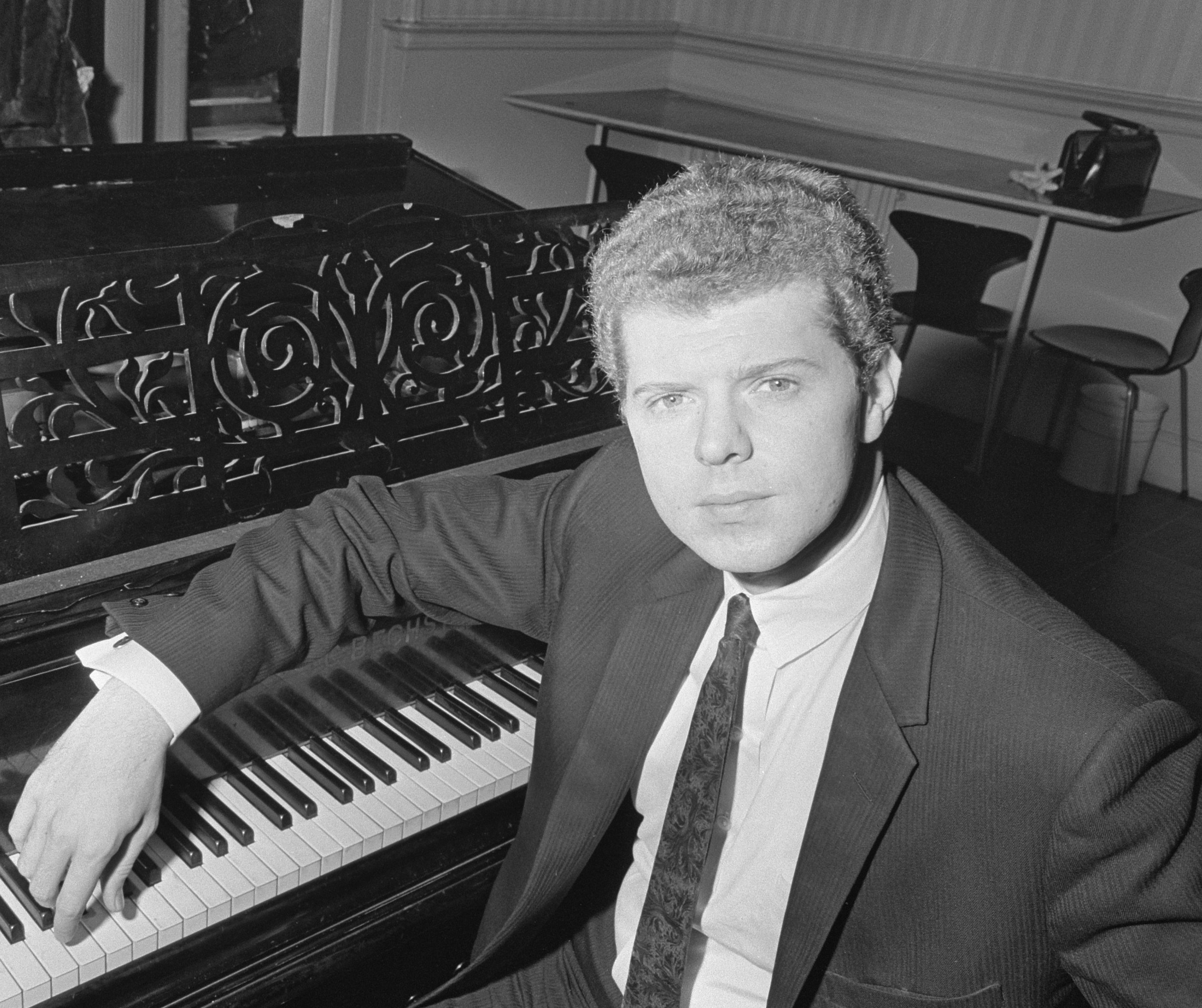 De Amerikaanse concert-pianist Harvey Lavan Van Cliburn repeteert in het Concertgebouw te Amsterdam voor zijn optreden tijdens het Grand Gala du Disque